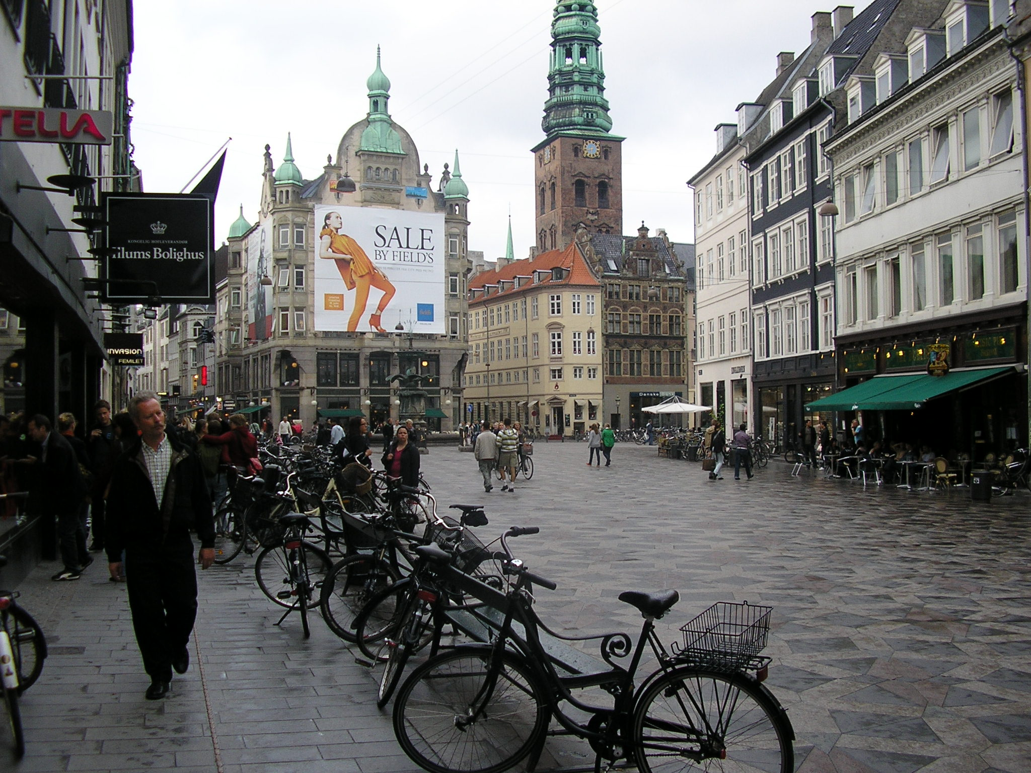 Strøget, Copenhagen